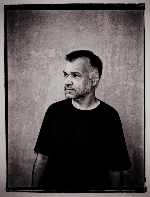 Selbstportrait